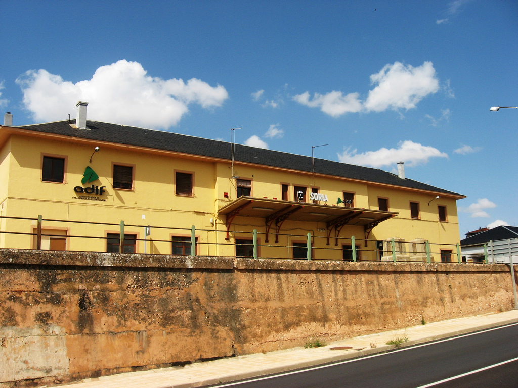 Estación de Renfe (Soria). Fachada.